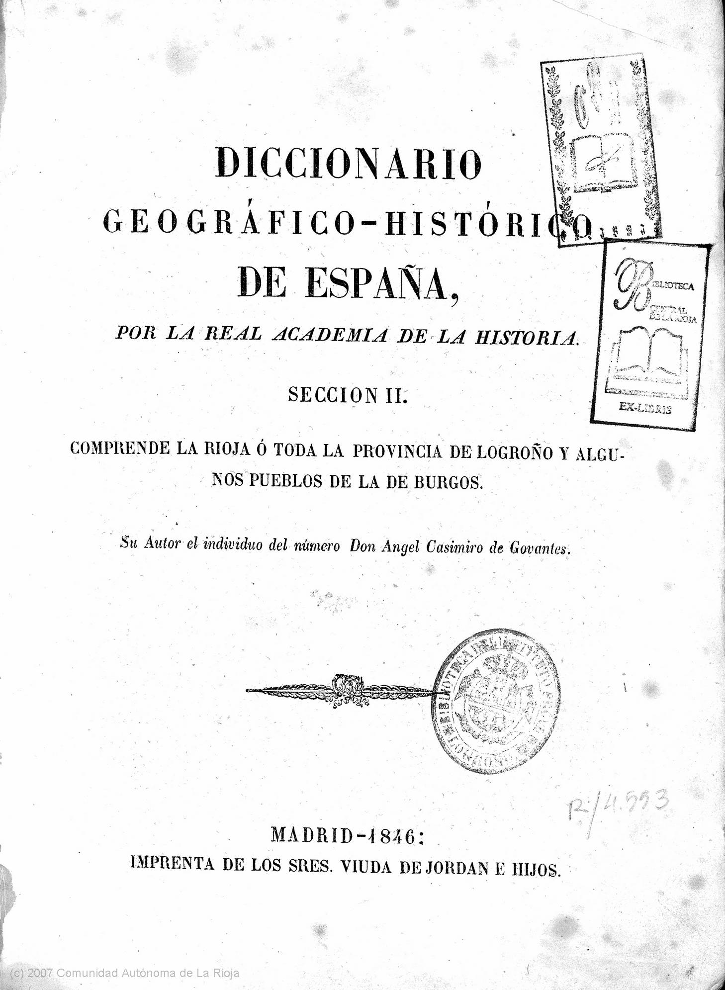 Diccionario geográfico-histórico de España. Sección II, Comprende La Rioja ó toda la provincia de Logroño y algunos pueblos de la de Burgos / su autor Angel Casimiro de Govantes publicado por la Real Academia de la Historia en 1846